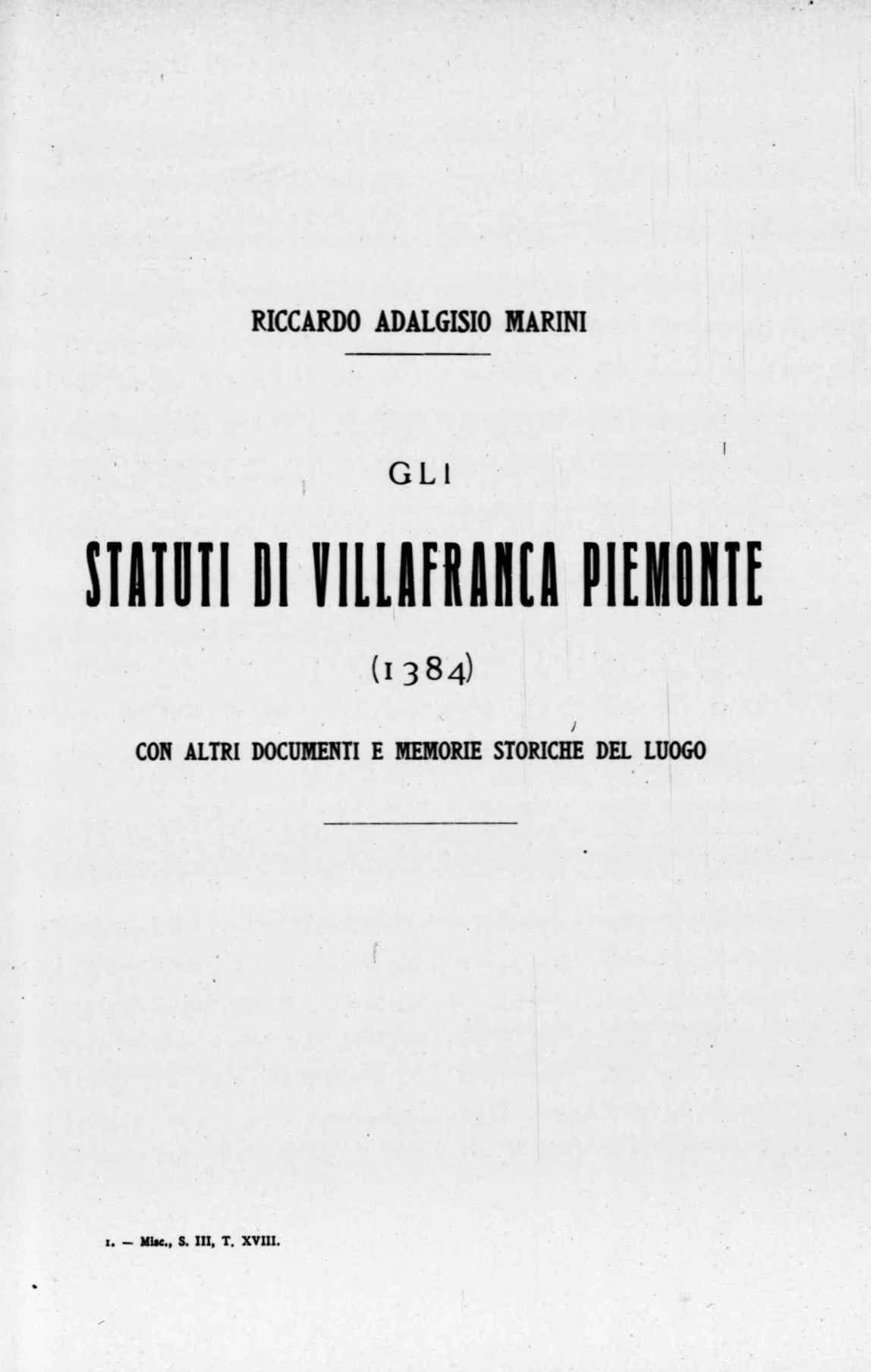 Frontespizio